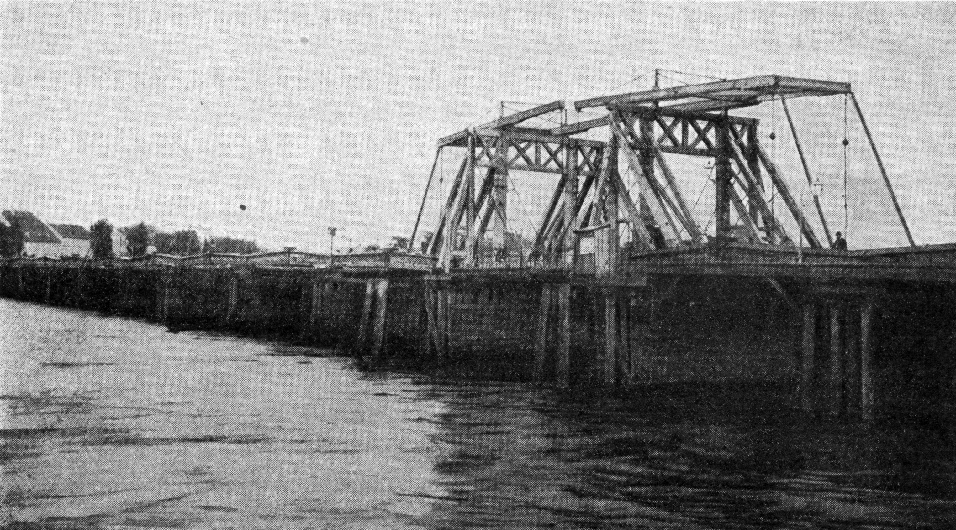 Originalbeschreibung: Abb. XVII. Einzelheit der alten Holzbrücke nach der Photographie des Herrn Oskar Mellenthin-Frankfurt a.O.